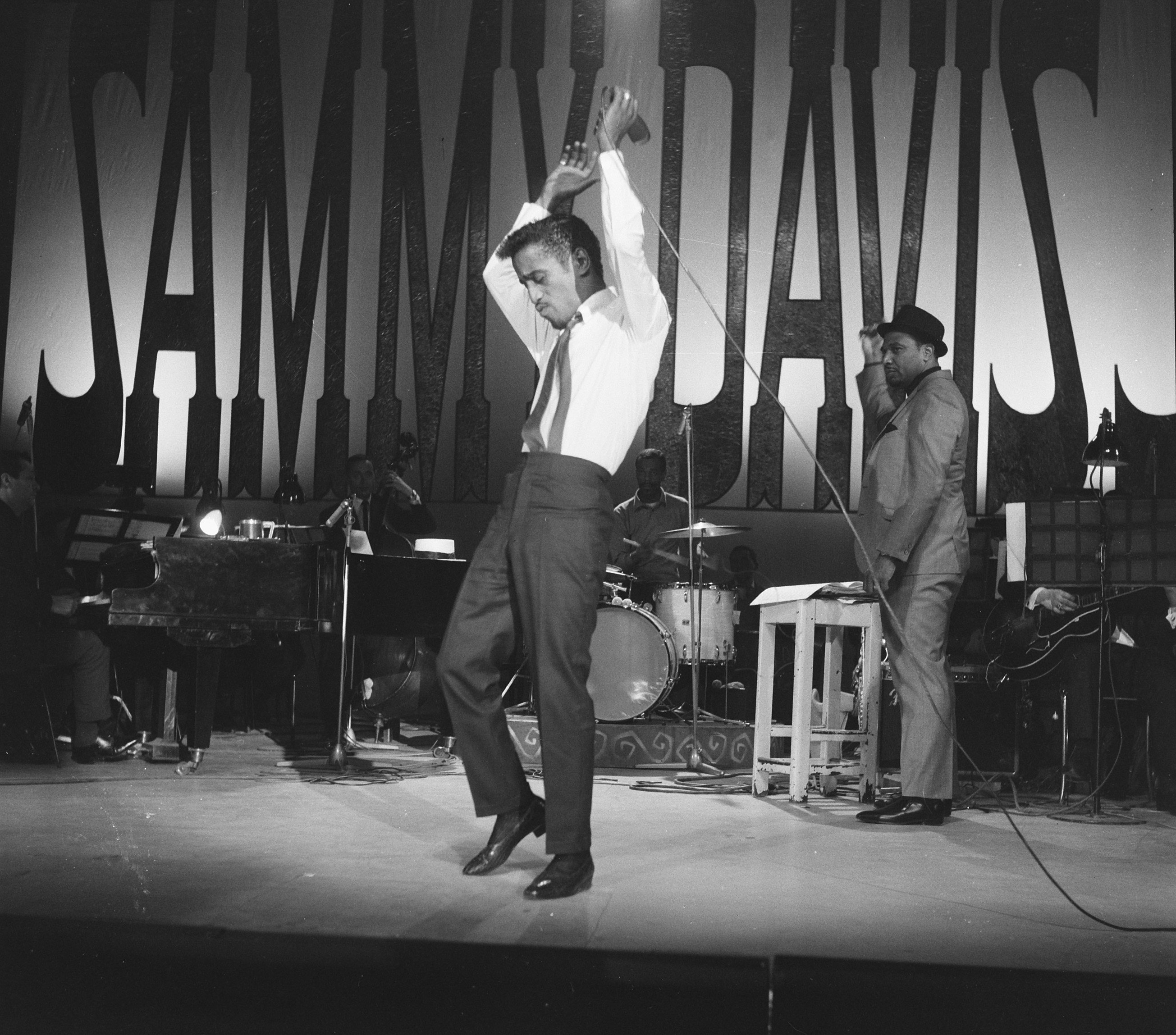 Collectie / Archief : Fotocollectie Anefo Reportage / Serie : [ onbekend ] Beschrijving : Sammy Davis Jr. tijdens optreden in theater Carre Datum : 20 maart 1964 Locatie : Amsterdam, Noord-Holland Trefwoorden : Optredens, theaters Instellingsnaam : Carré Fotograaf : Gelderen, Hugo van / Anefo Auteursrechthebbende : Nationaal Archief Materiaalsoort : Negatief (zwart/wit) Nummer archiefinventaris : bekijk toegang 2.24.01.03 Bestanddeelnummer : 916-2013